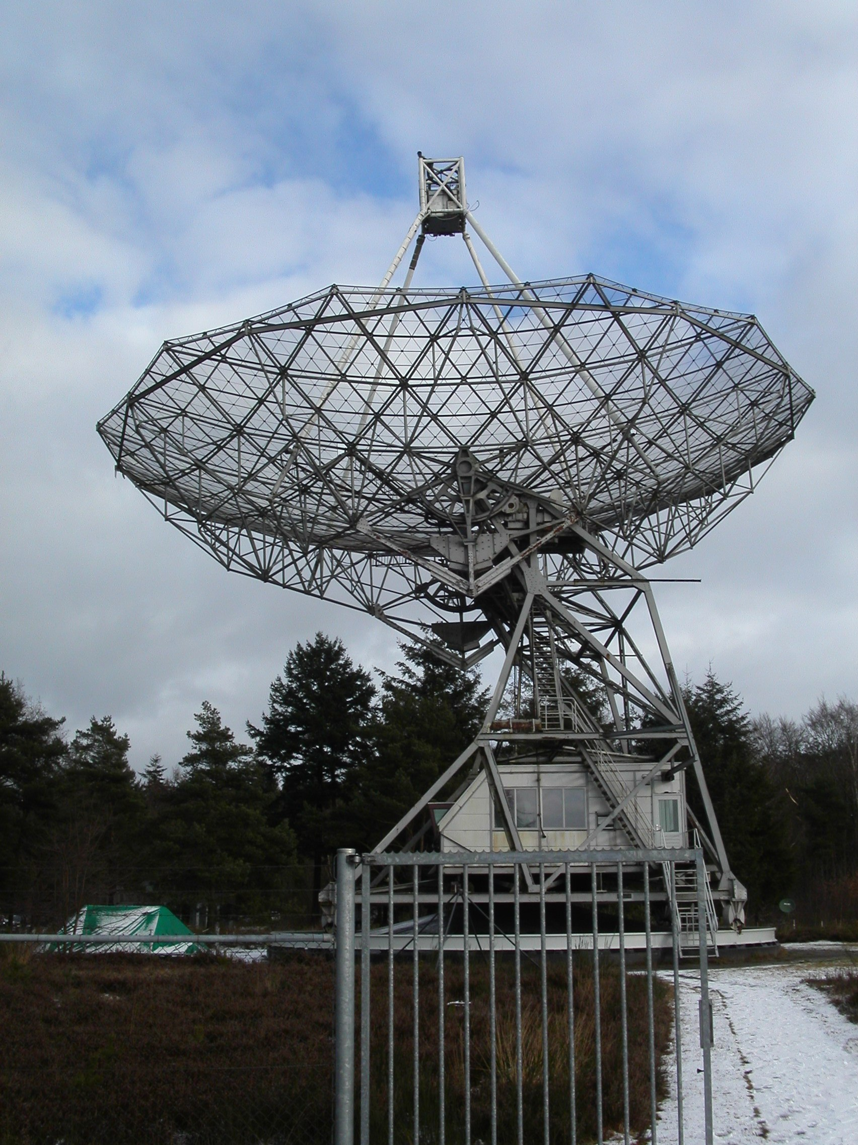 Radio telescope in Dwingeloo, Netherlands